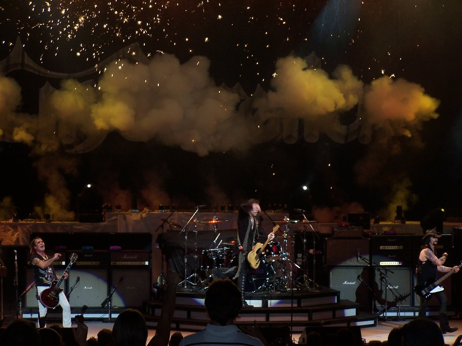 Cinderella image